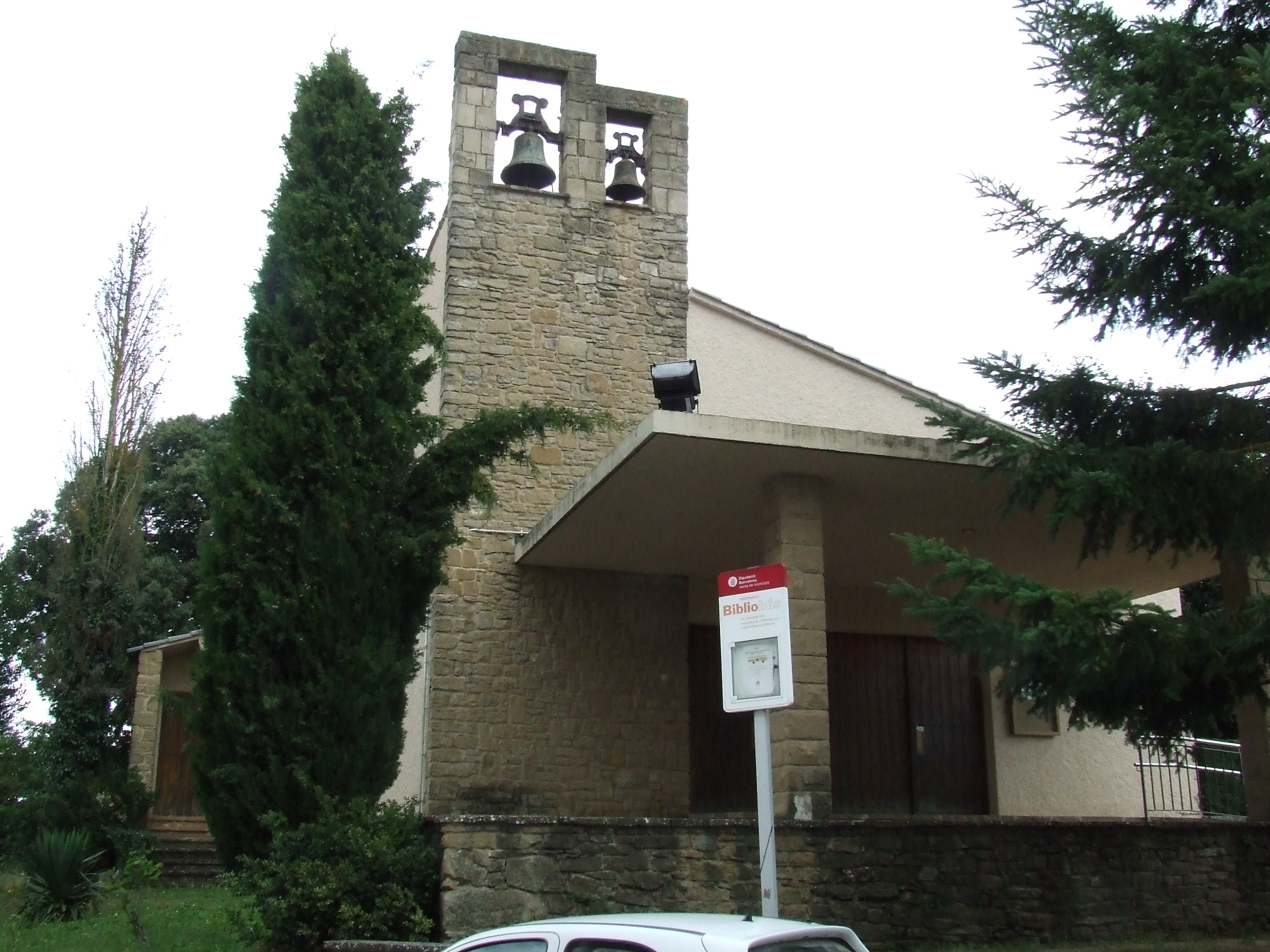 Santa Maria de Castellcir (Moianès)